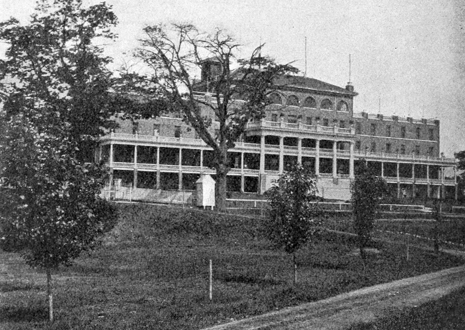 Brant Hotel - Burlington, Ontario